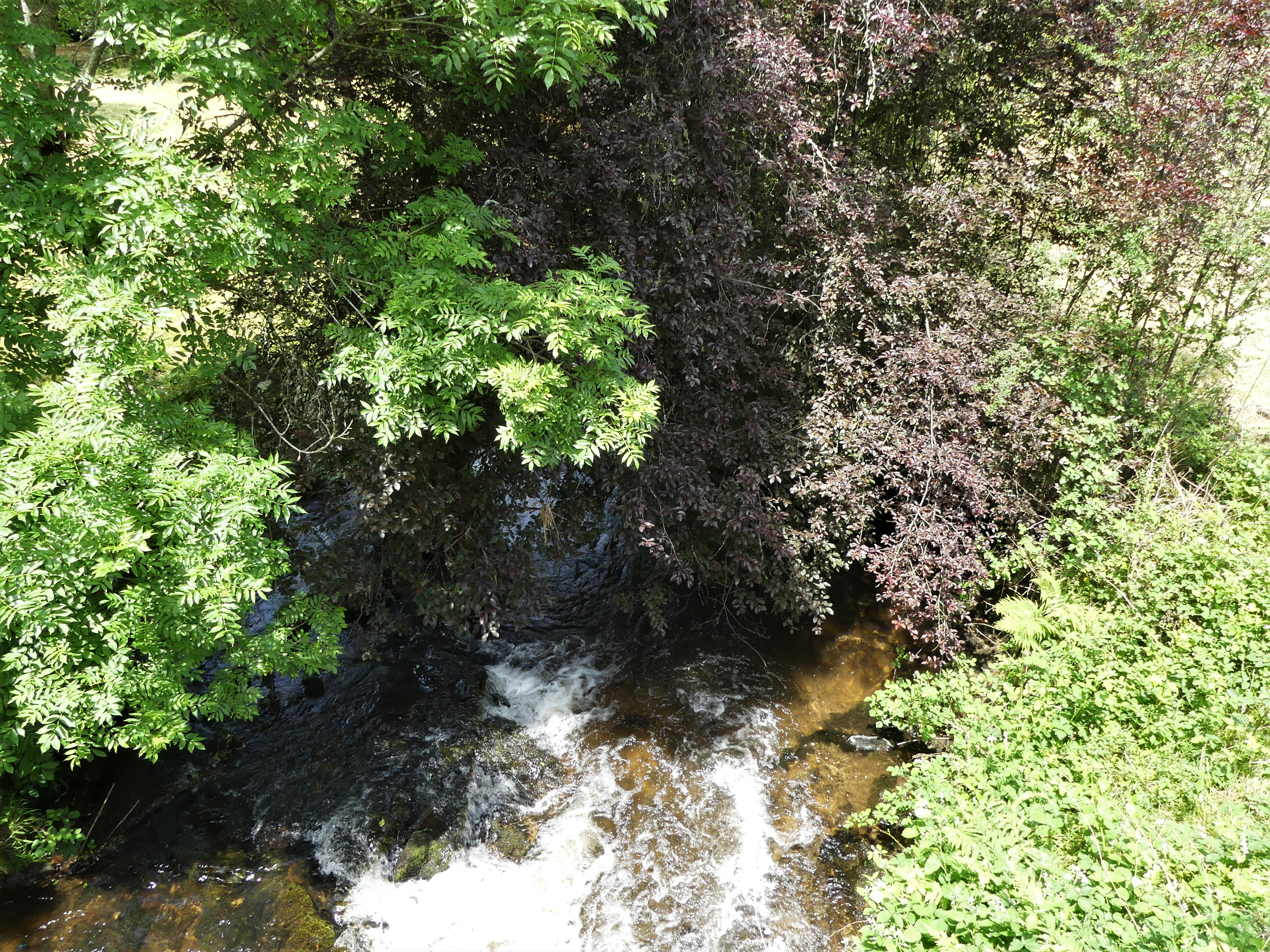 Le ruisseau de Boulou en aval du pont de la route départementale 3E3, Le Lonzac, Corrèze, France.